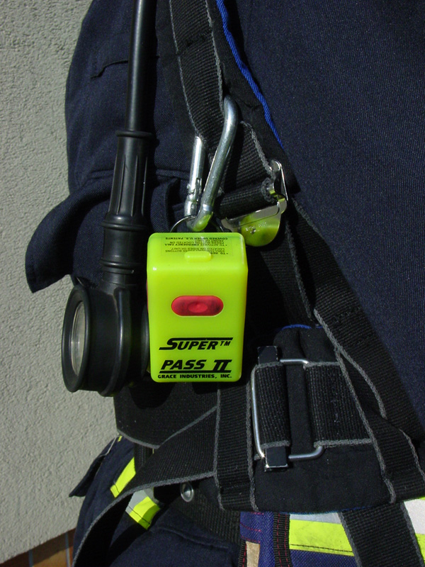 Fotos eines Totmanngerätes im Einsatz bei der Feuerwehr.